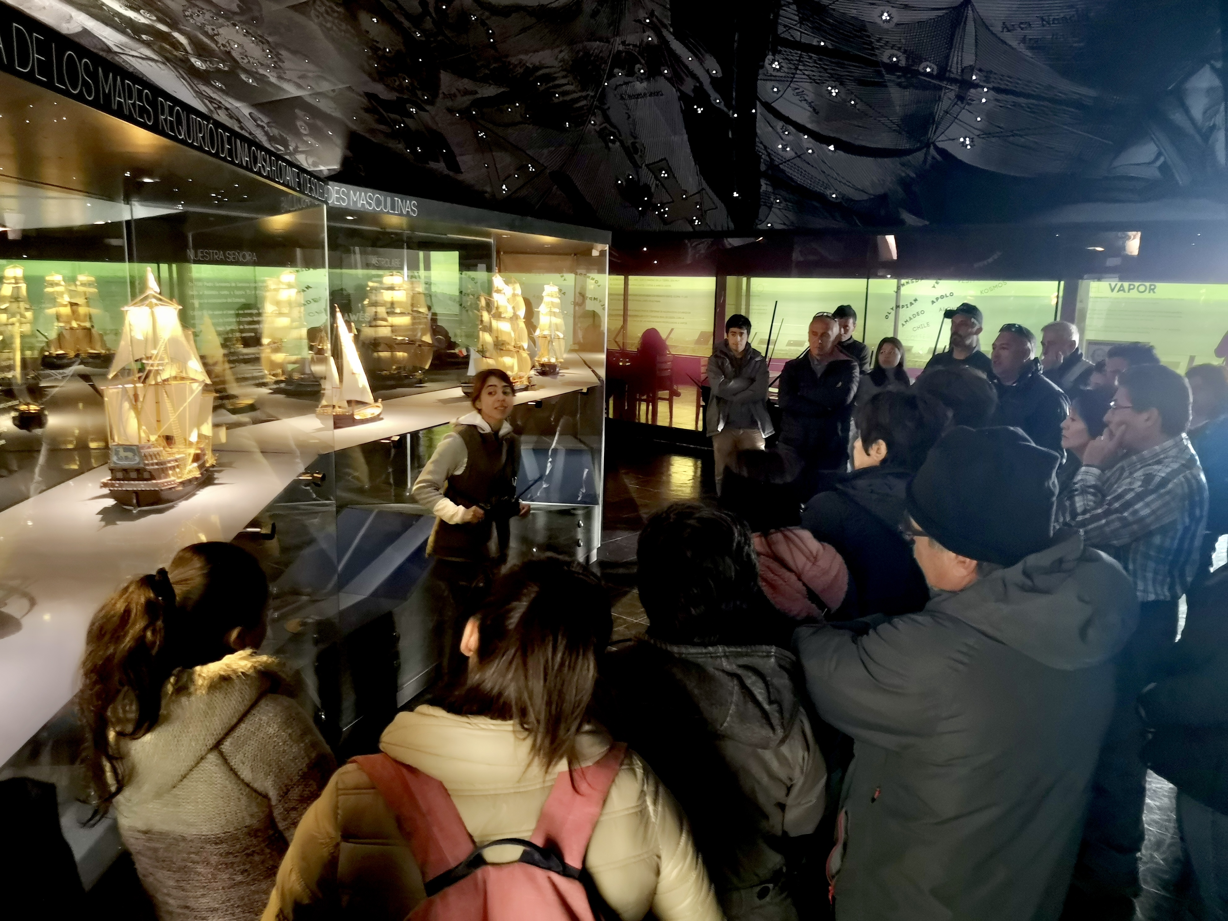 En el Museo del Estrecho se puede conocer la historia de la formación del territorio, sus habitantes y las embarcaciones que llegaron hasta el Estrecho a lo largo de la historia.